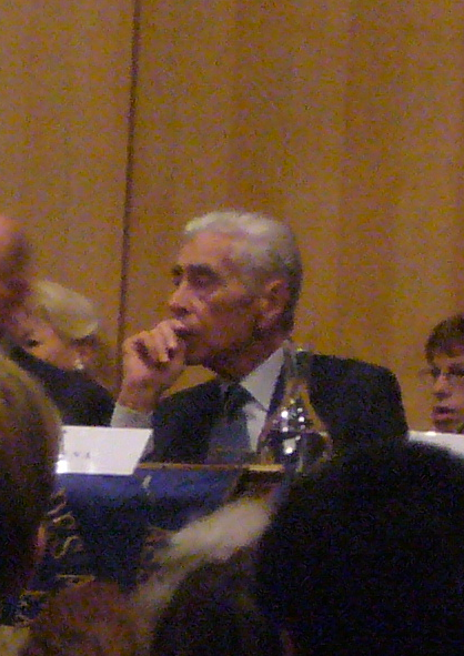 Yves Guéna, ancien président du Conseil Constitutionnel, ancien maire de Périgueux, ancien sénateur, ancien député, ancien ministre